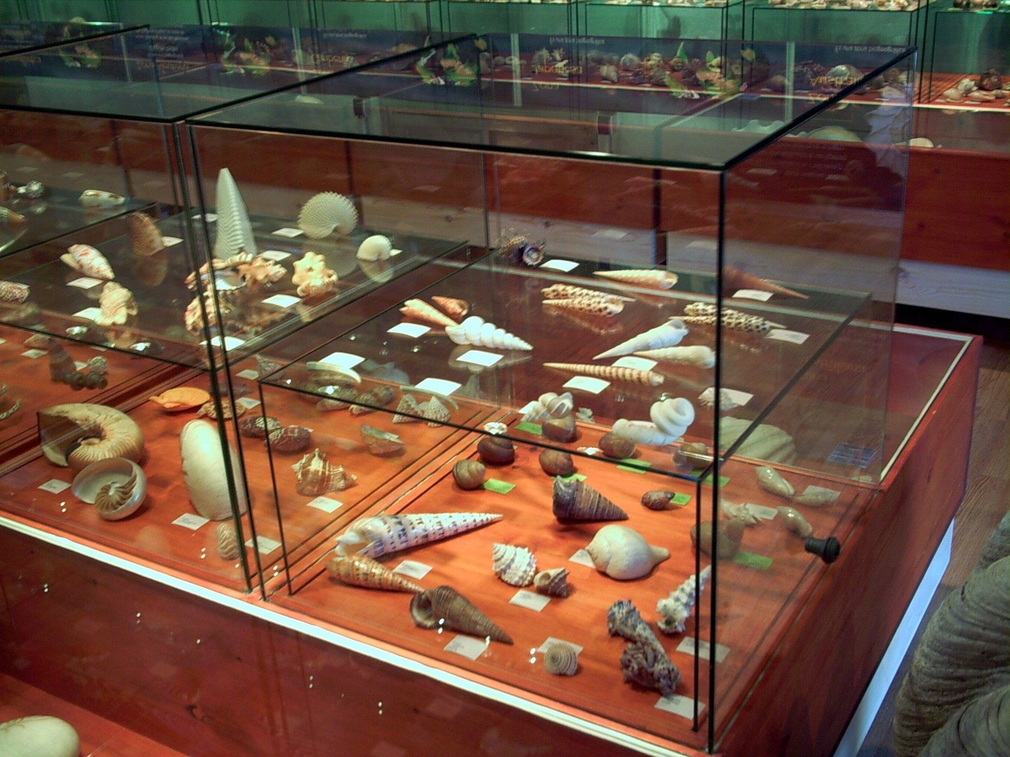 Vitrin de fauna IndoPacífica, al Cau del Cargol, a Vilassar de Dalt, al Maresme, (Catalunya).